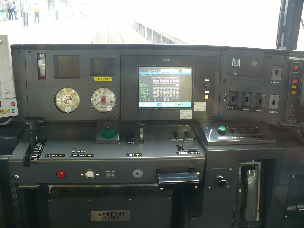 小田急3000形運転台